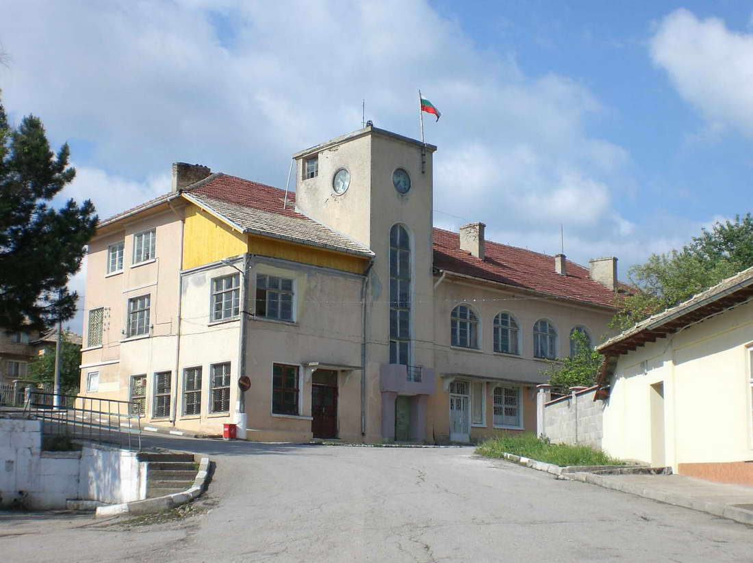 Поглед към сградата на кметството на село Еленово, Поповско - 2007 год.